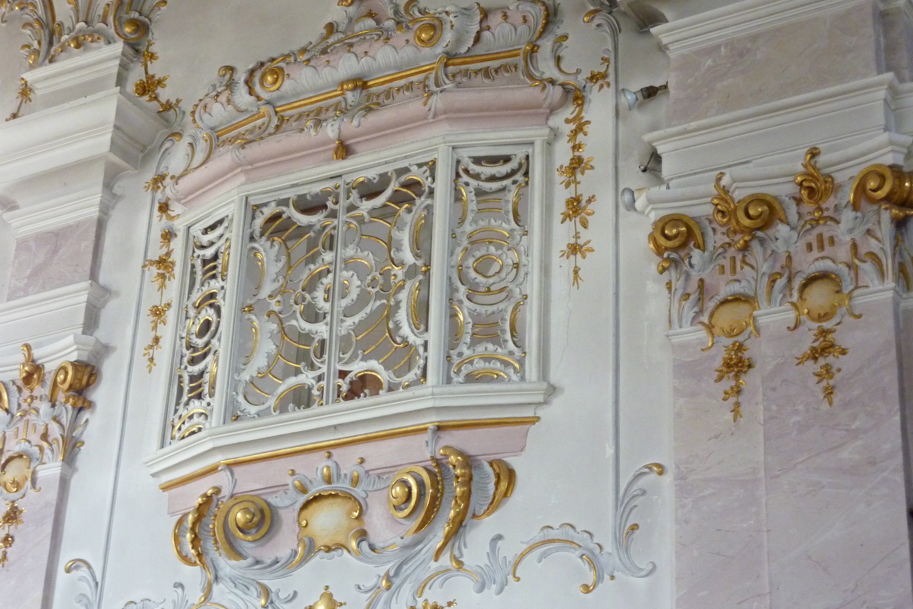 Katholische Wallfahrtskirche Mariä Himmelfahrt in Buggenhofen, einem Ortsteil von Bissingen im Landkreis Dillingen an der Donau (Bayern), Patronatsloge mit geschnitzten Holzgittern im Stil des Rokoko